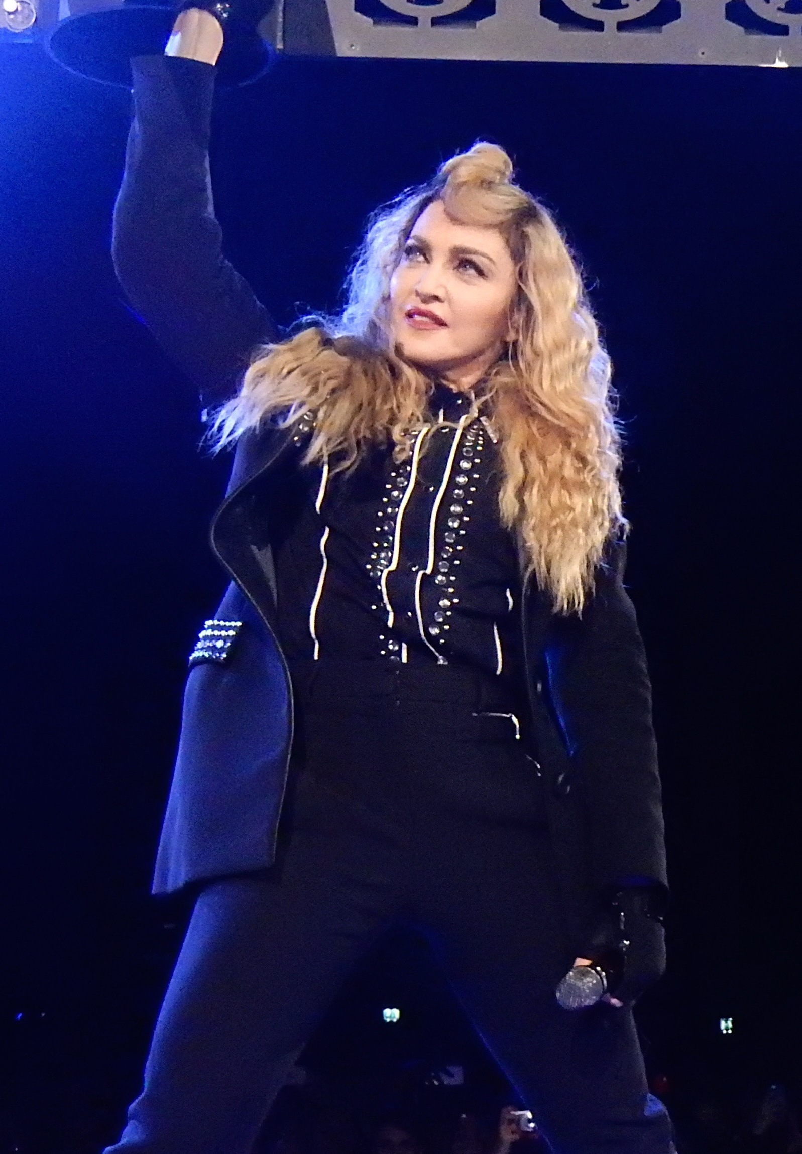 Madonna Rebel Heart Tour 2015 - Amsterdam 2